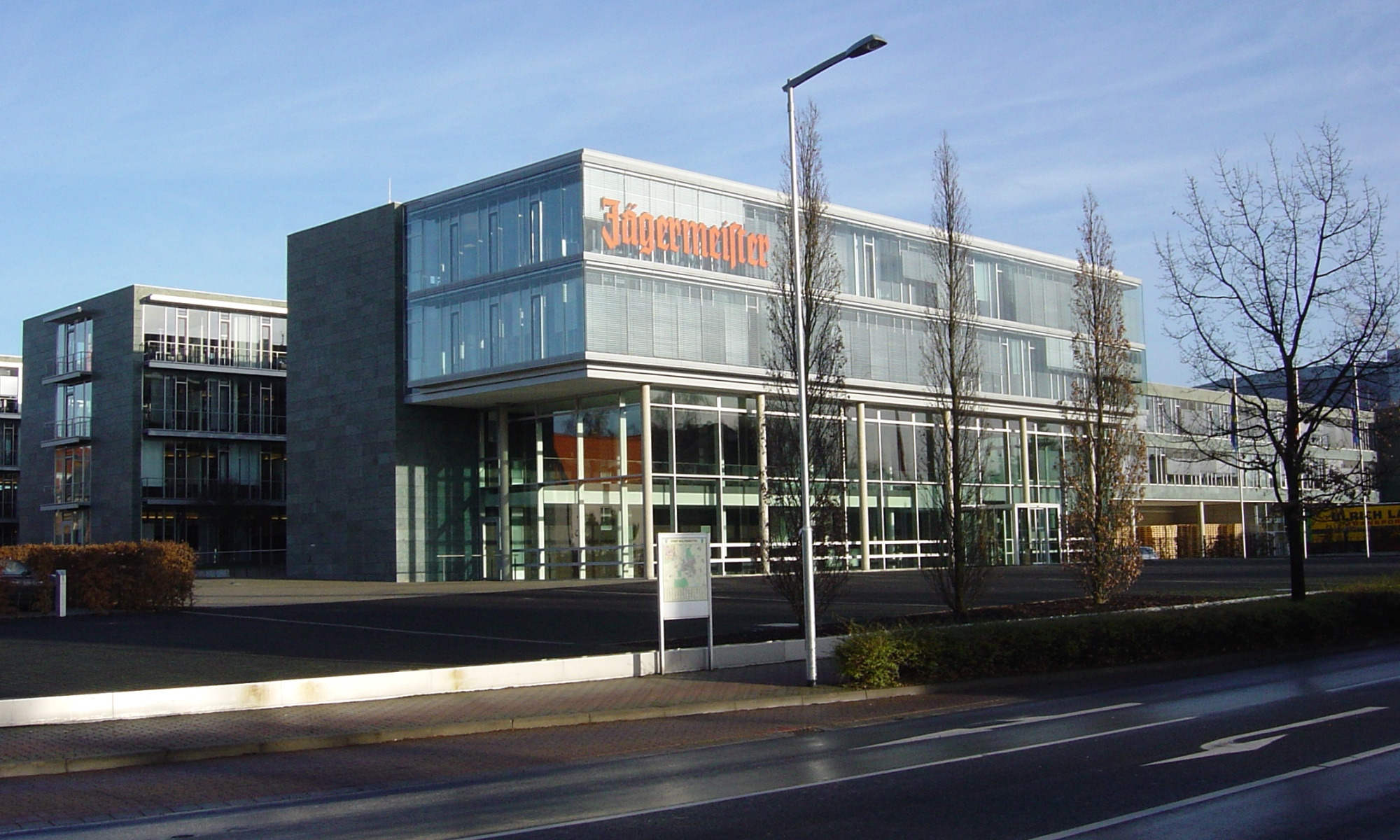 Mast-Jägermeister AG, Jägermeisterstraße 7, 38296 Wolfenbüttel